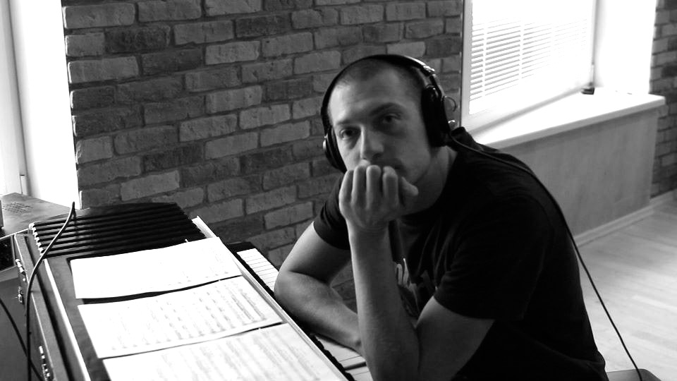 Recording of an album "Ziedonis.Lācis.Sievietes"